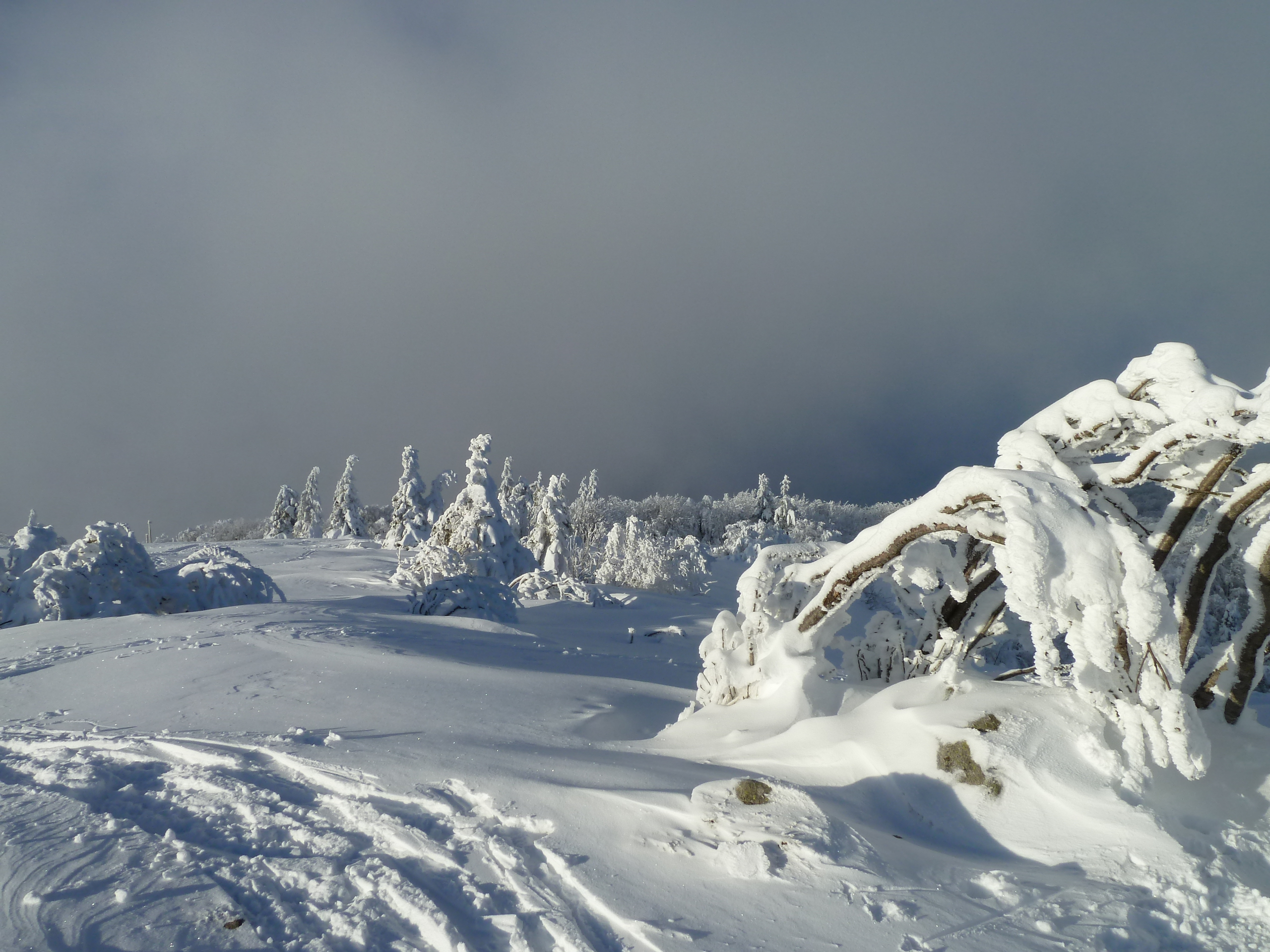 Hauts de la Schlucht avec arbres gelés (Hautes-Vosges)